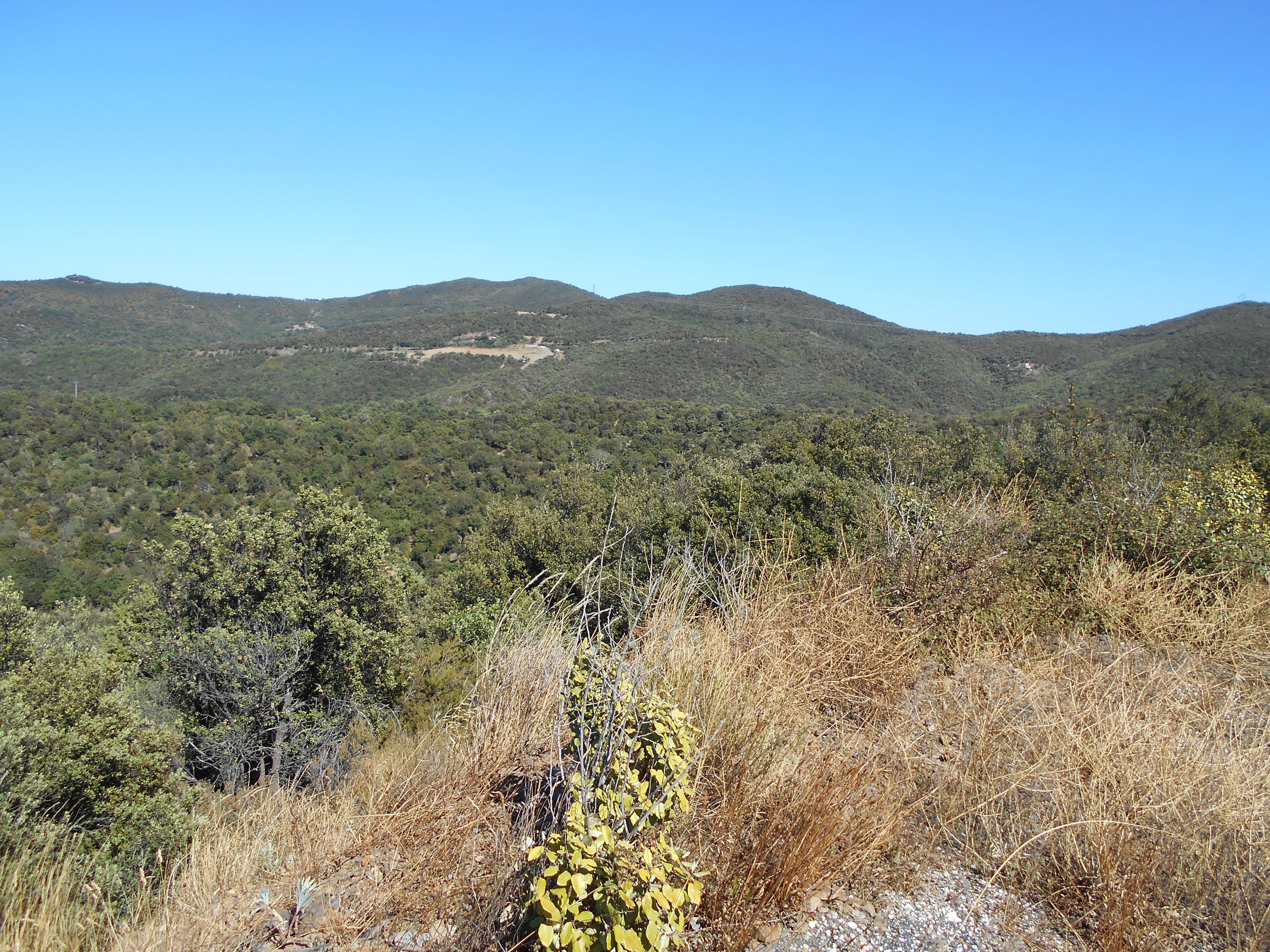 El Mas d'en Grau